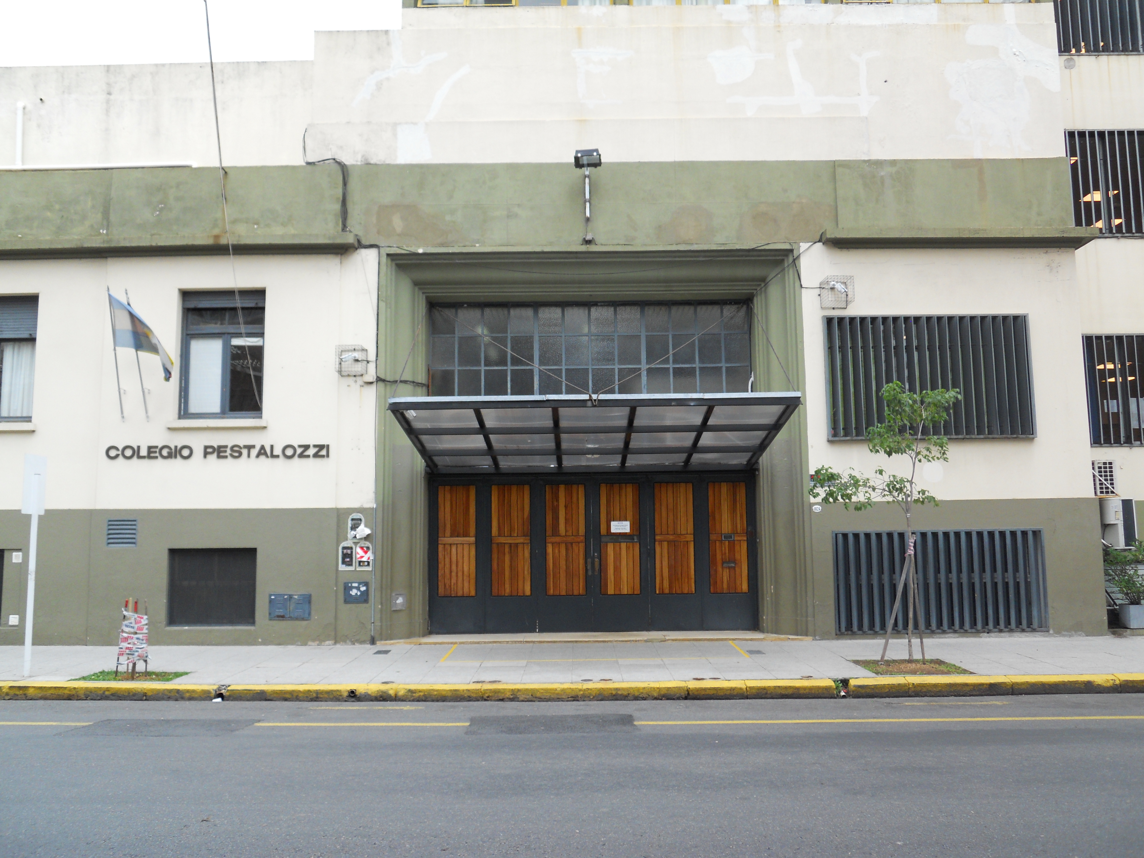 Colegio Pestalozzi, Belgrano R